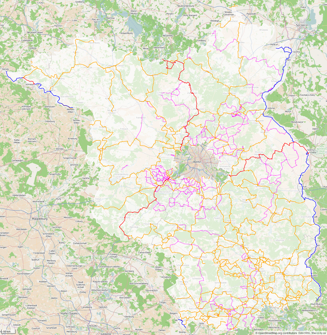 Visualisierung der in OpenStreetMap angelegten Radrouten für das Bundesland. Erstellt durch cmuelle8's Abfrage auf overpass-turbo.eu. Farbkodierung rot/red europäische und internationale Radrouten blau/blue nationale Radrouten des D-Netz orange regionale und überregionale Radrouten pink/magenta lokale und regionale Radrouten